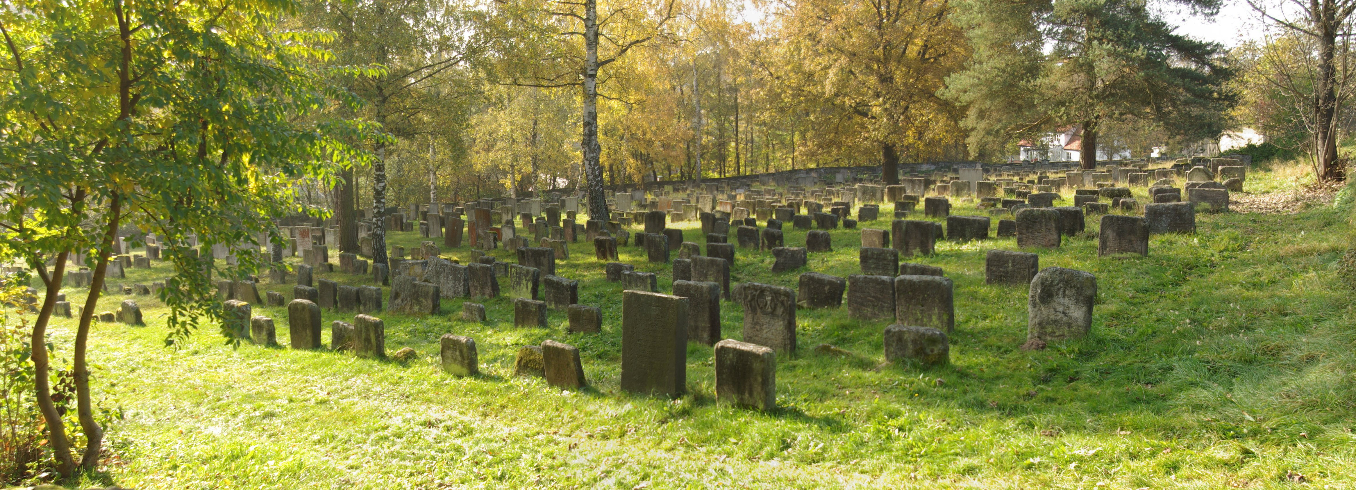 Jüdischer Friedhof in Georgensgmünd